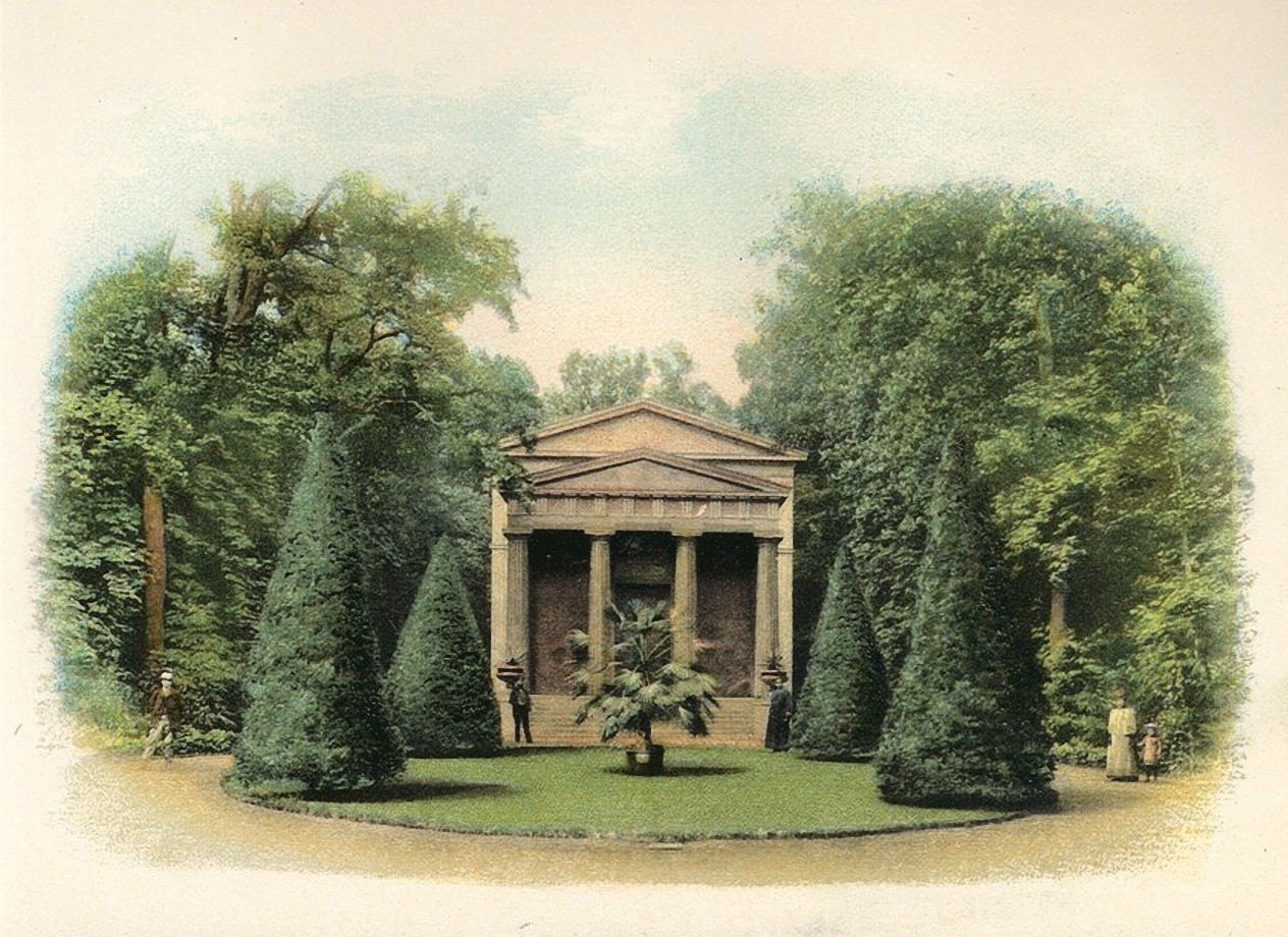 Berlin, Mausoleum für Königin Luise von Preußen im Schlosspark Charlottenburg, Außenansicht.